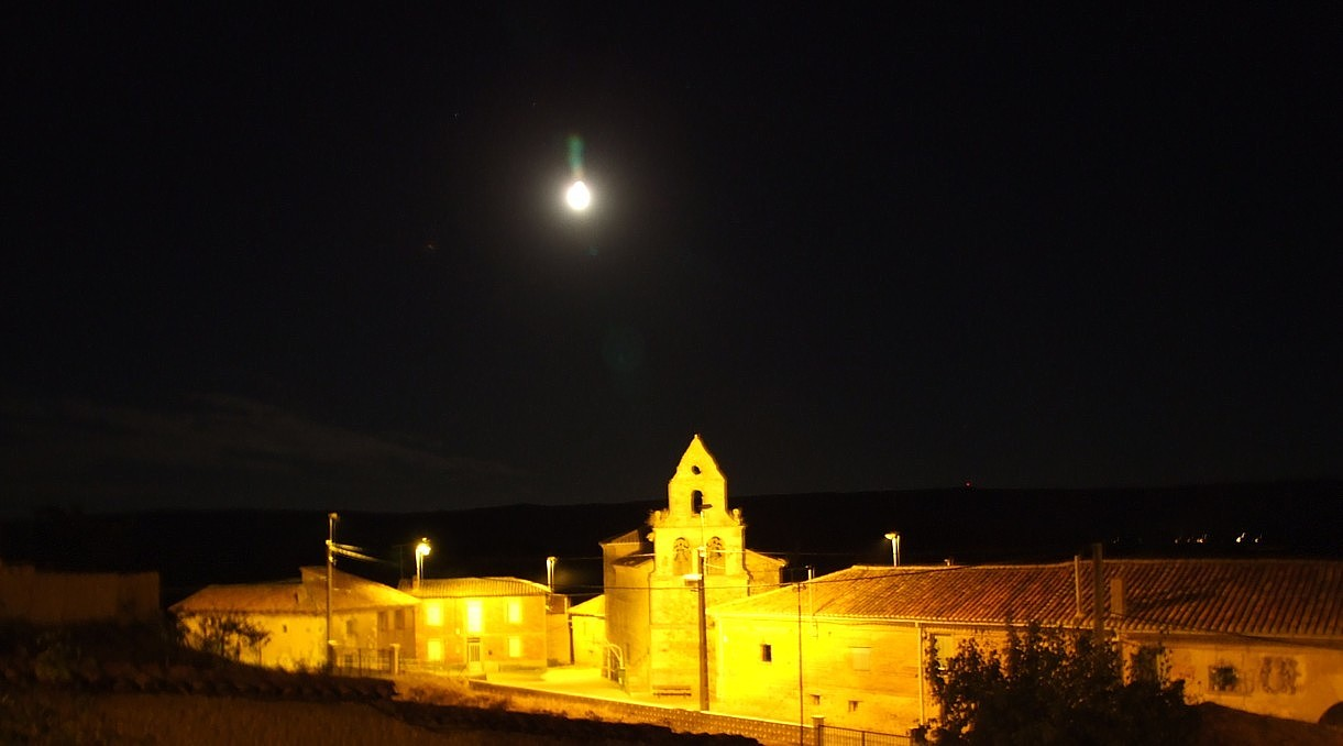 Castro del Condado vista nocturna